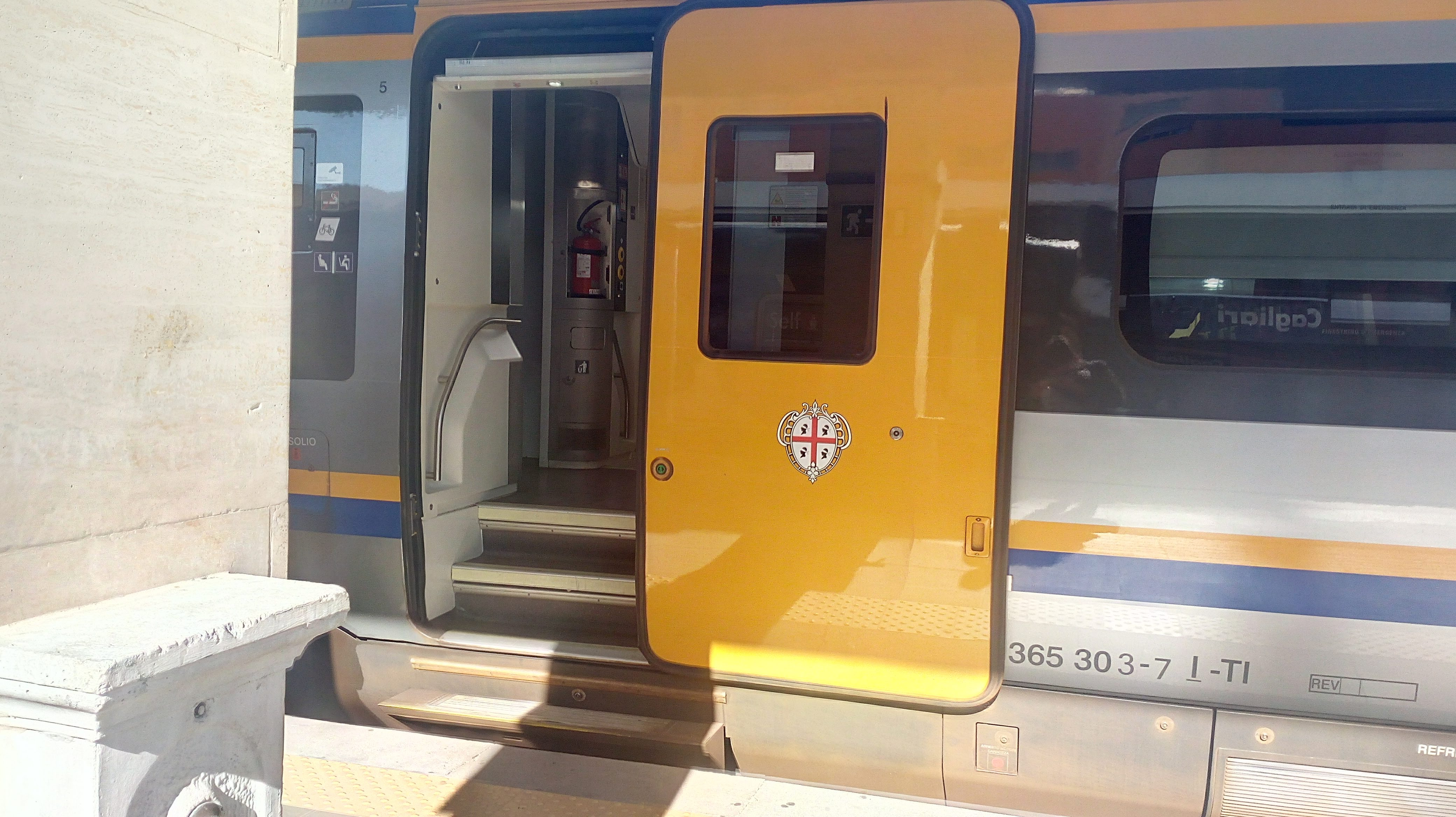 Porta di un ATR365 fermo a Cagliari, con livrea DTR di Trenitalia.